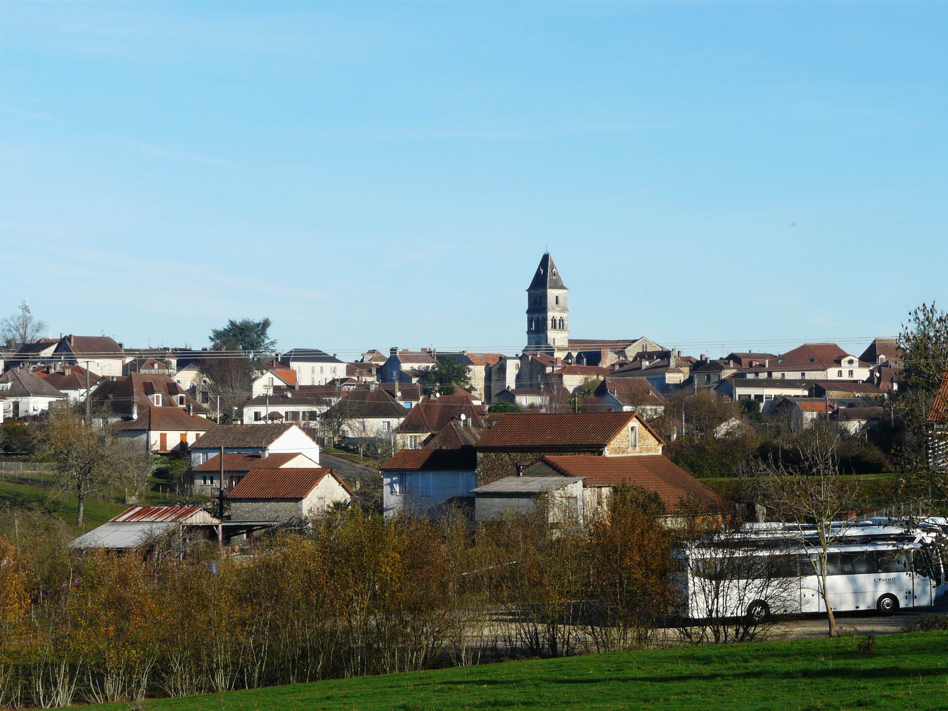 Vue générale de Thiviers, Dordogne, France.